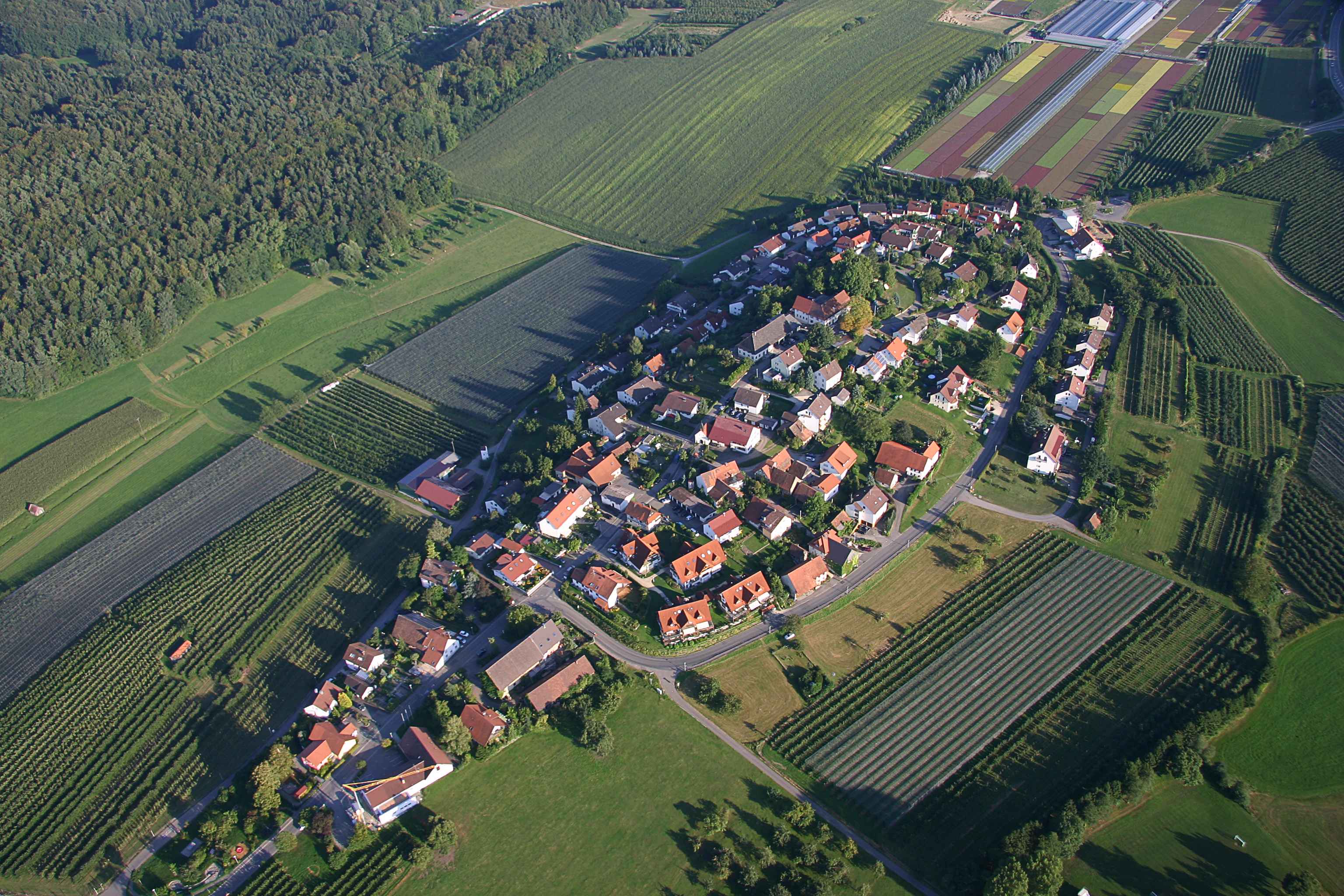 Blick auf den auf einem Drumlin gelegenen Ortsteil Friedrichshafen-Raderach